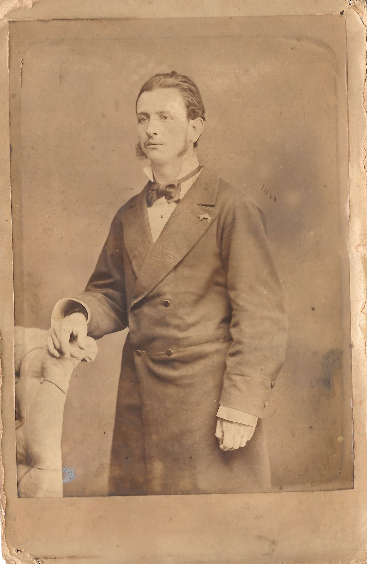 retrato